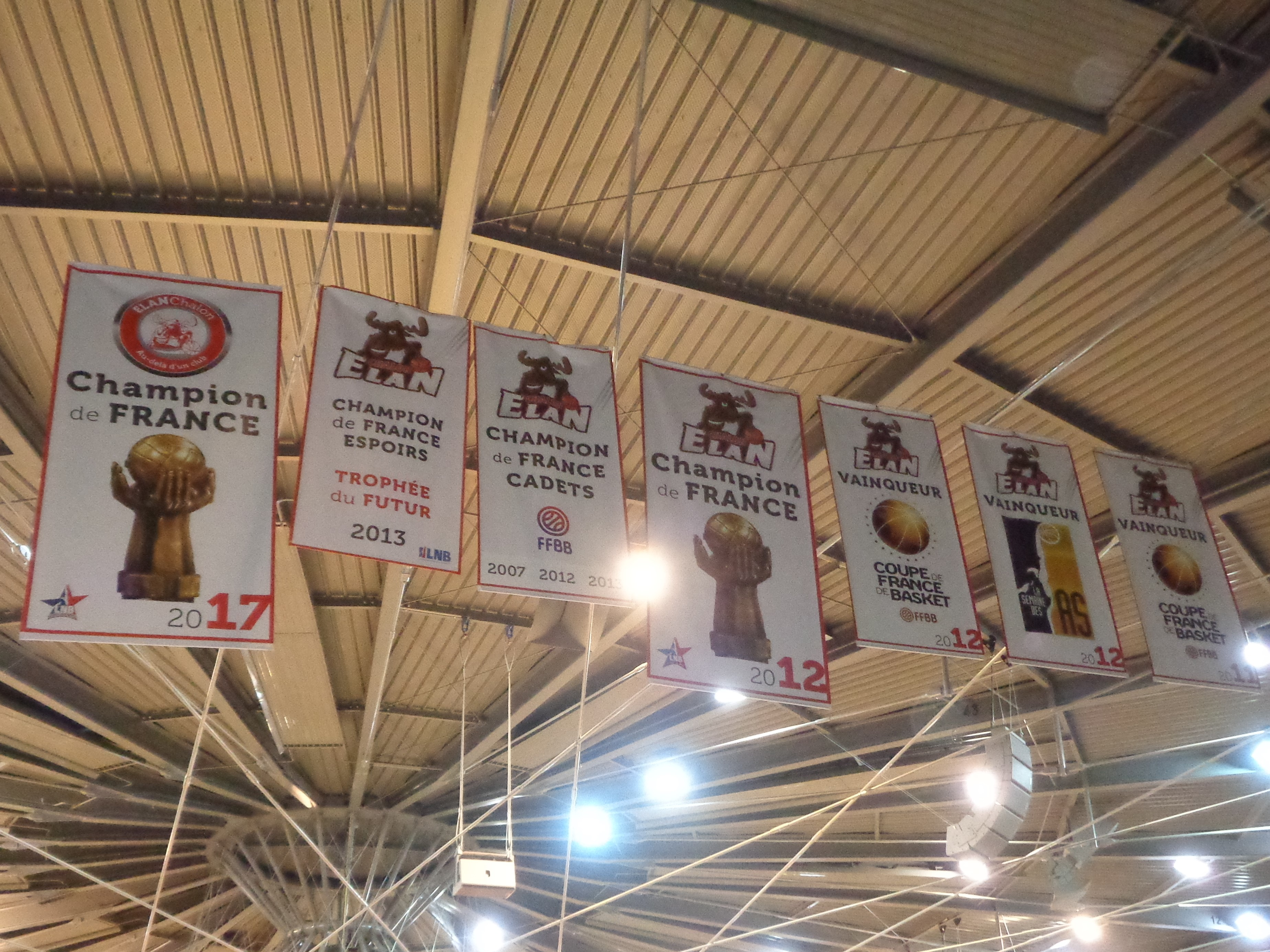 Les bannières des titres de l'Elan Chalon en 2017.